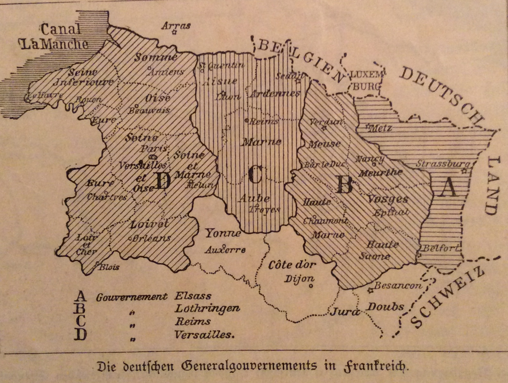 Carte des gouvernements de la zone occupée en 1870-1871